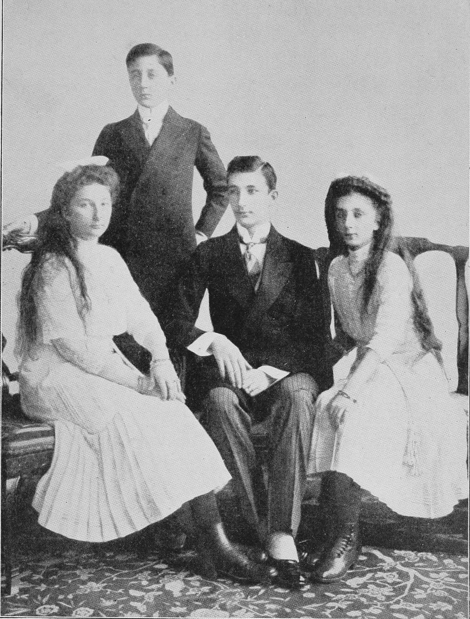 Los hijos de Fernando de Bulgaria. De izquierda a derecha: Edudoxia, Kyril (Cirilo), Boris y Nadejda (Esperanza).